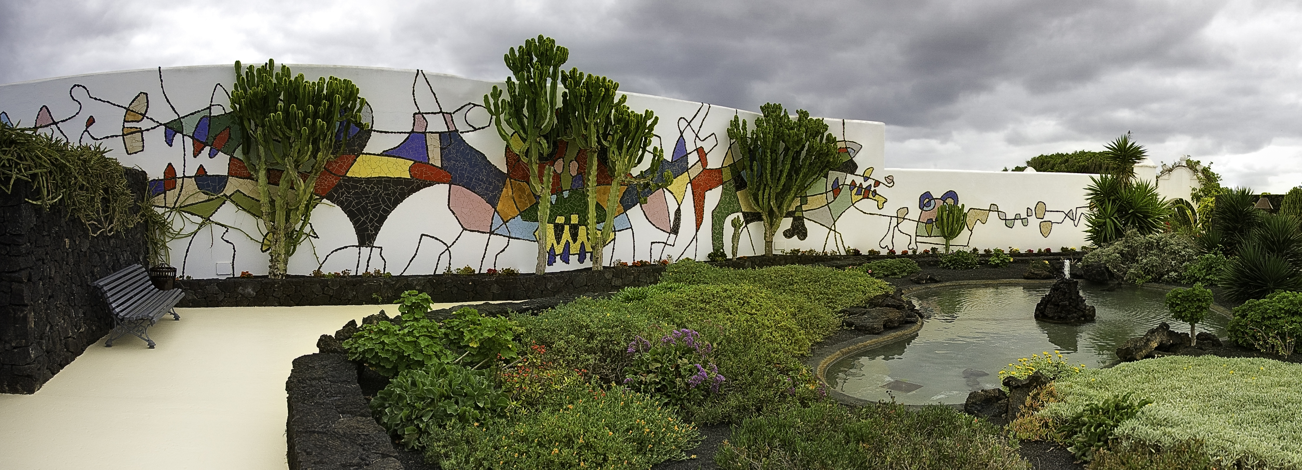 Mosaik, Fundacion, Cesar Manrique, Lanzarote